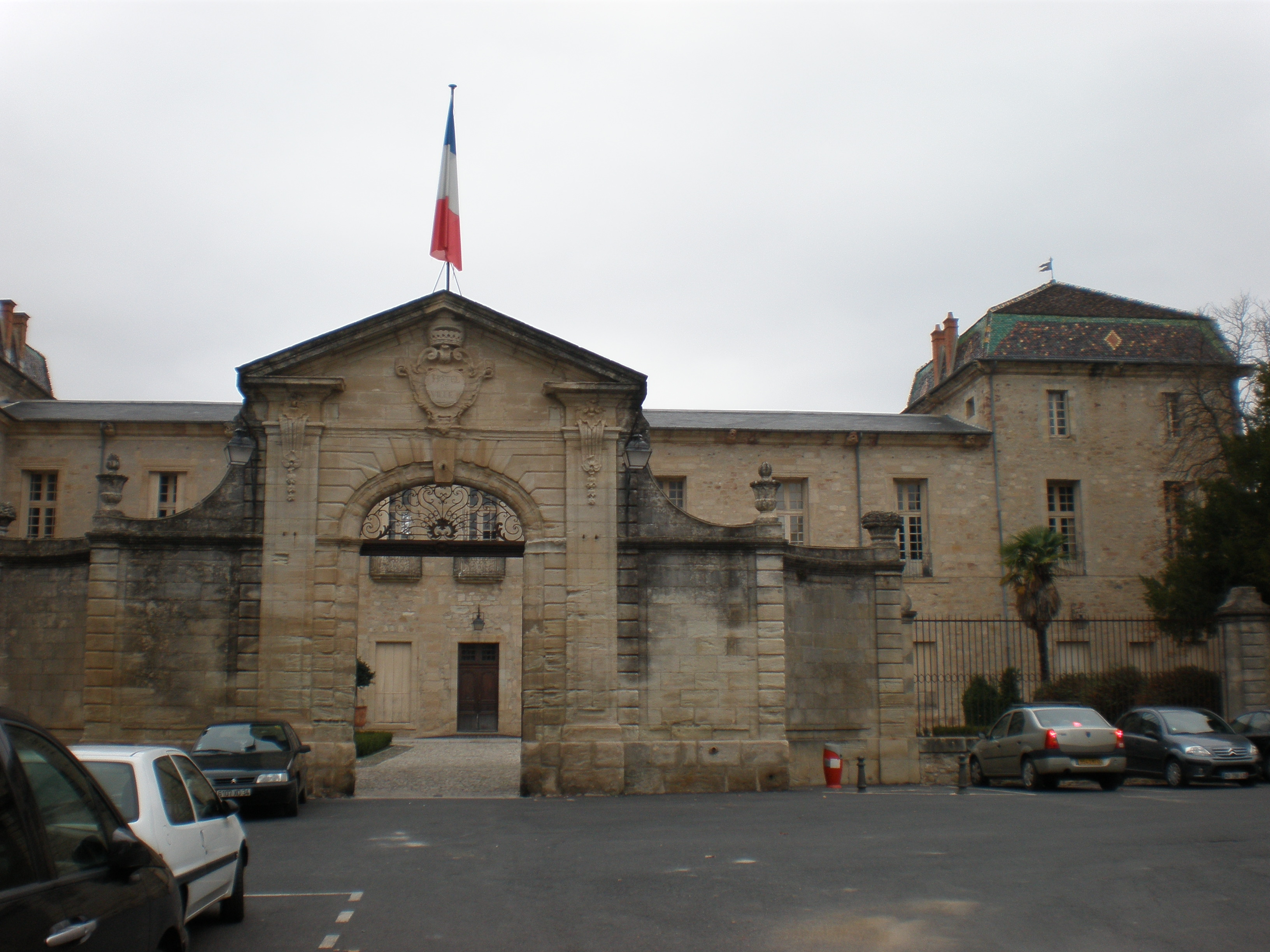 La mairie de Lodève (Hérault)